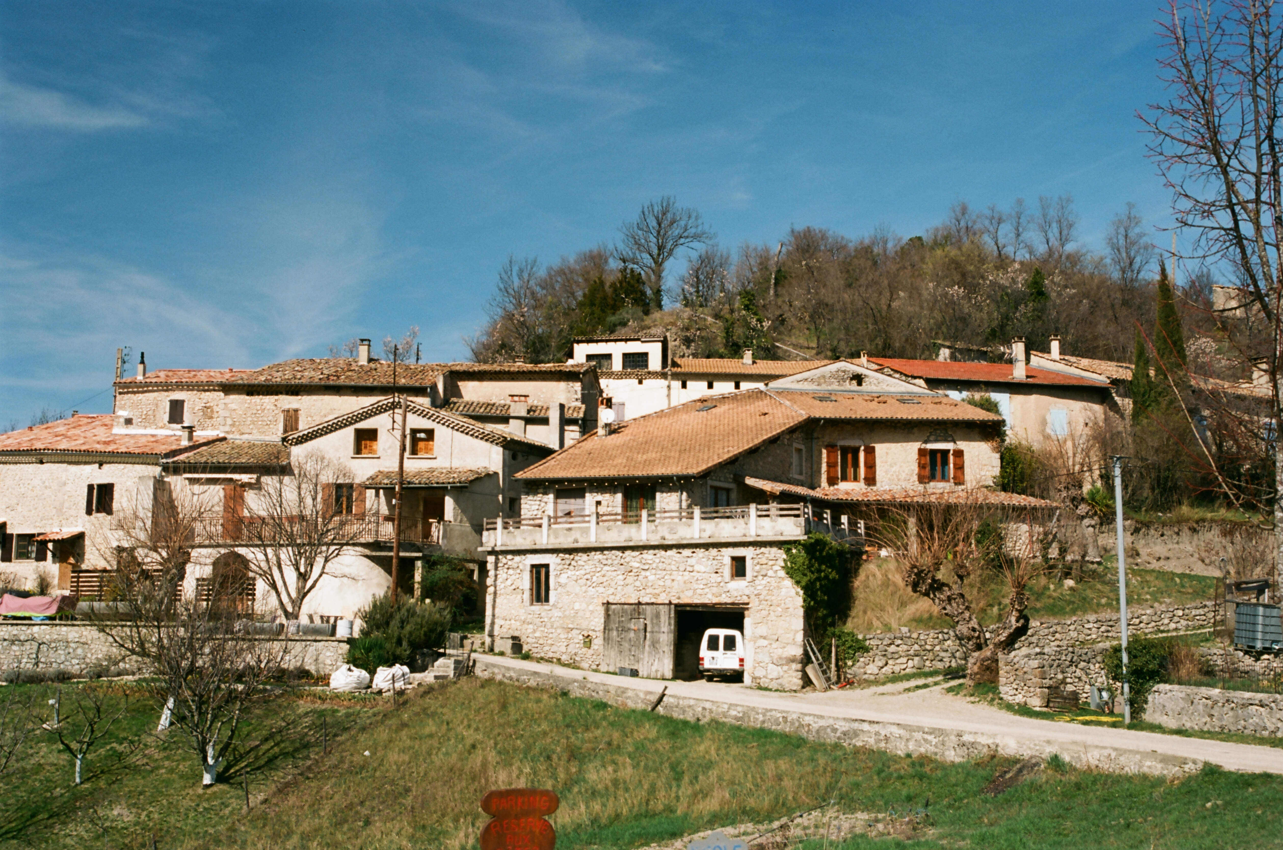 Ancien village de Jansac